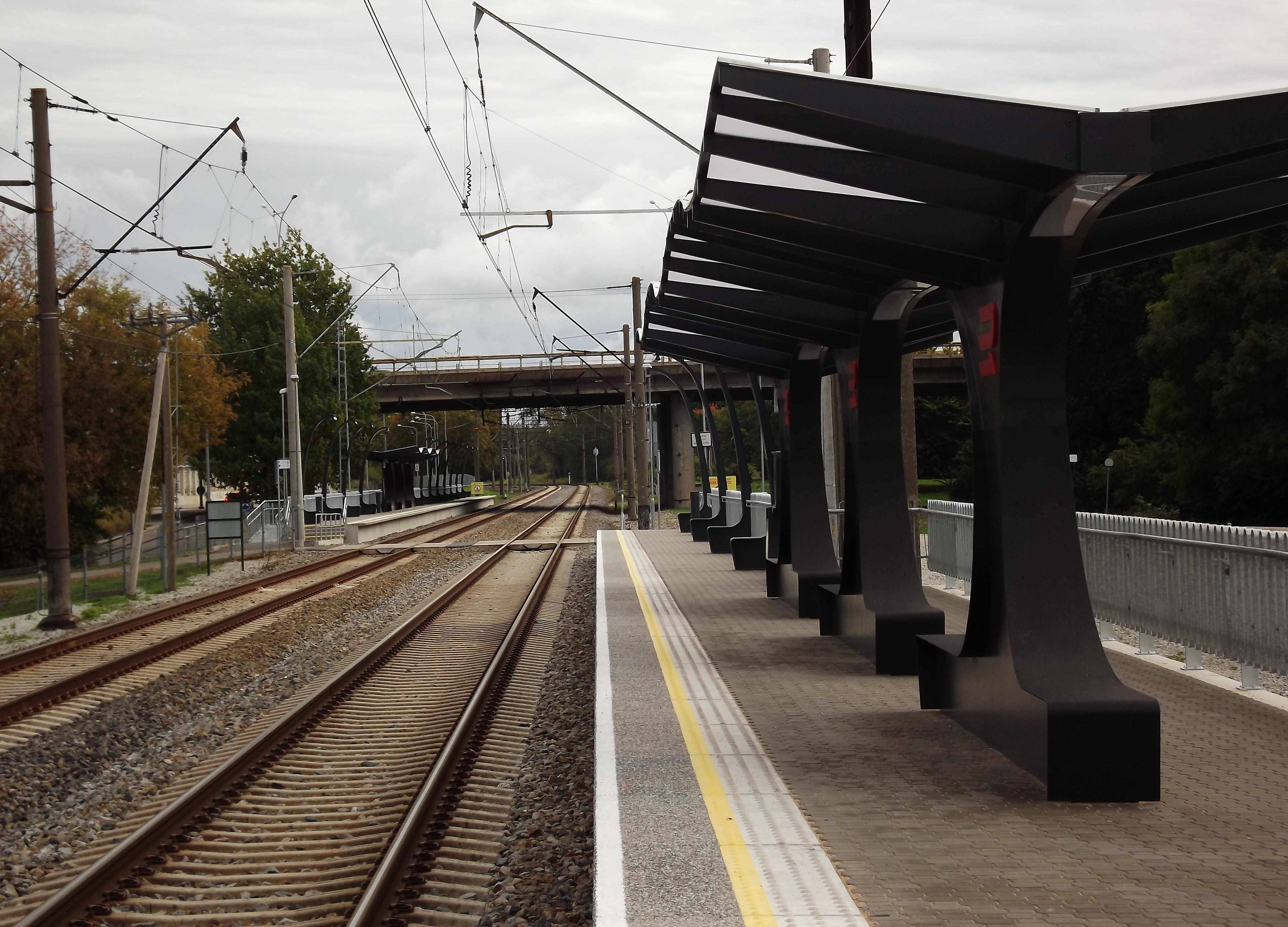 Kitseküla raudteepeatus